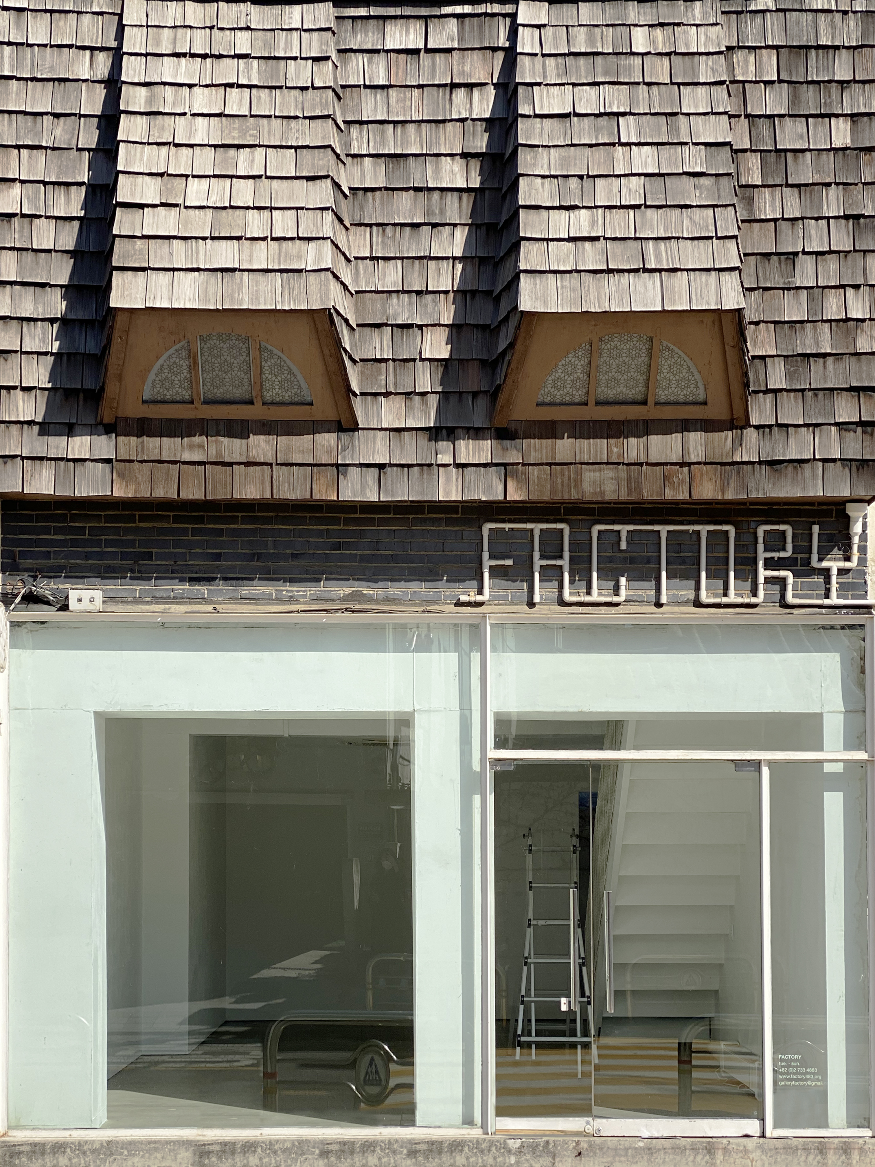 팩토리2의 지붕 Randi & Katrine의 작업